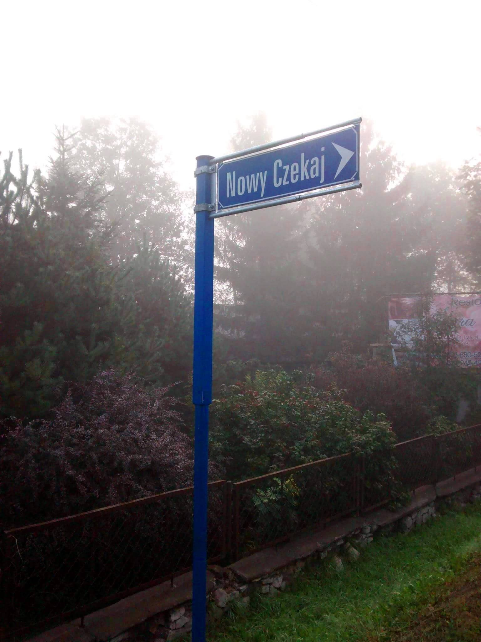 Tablica z nazwą ulicy Nowy Czekaj w Katowicach-Dąbrówce Małej